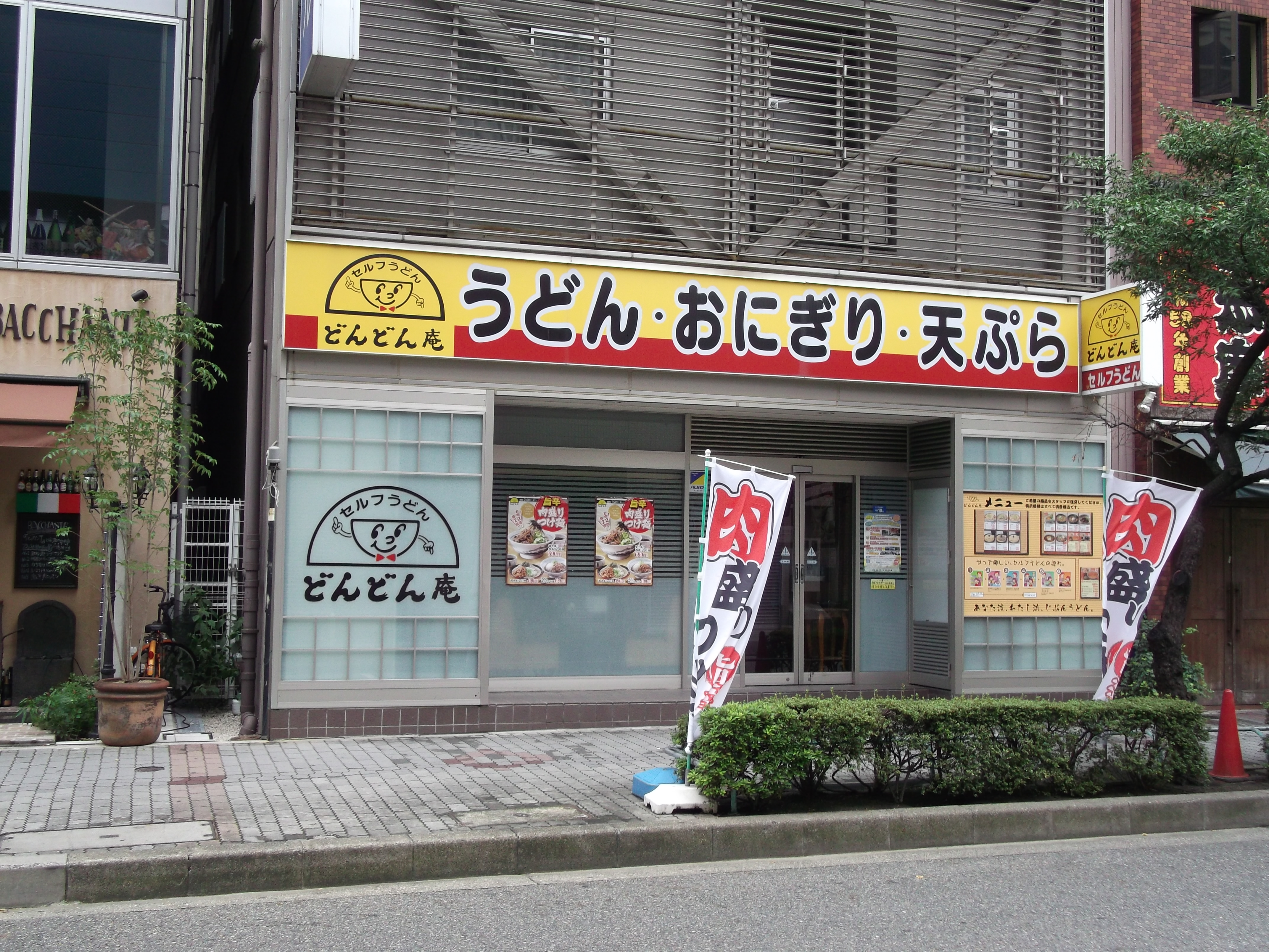 名古屋市中区栄二丁目のどんどん庵伏見店を西側公道北側より撮影